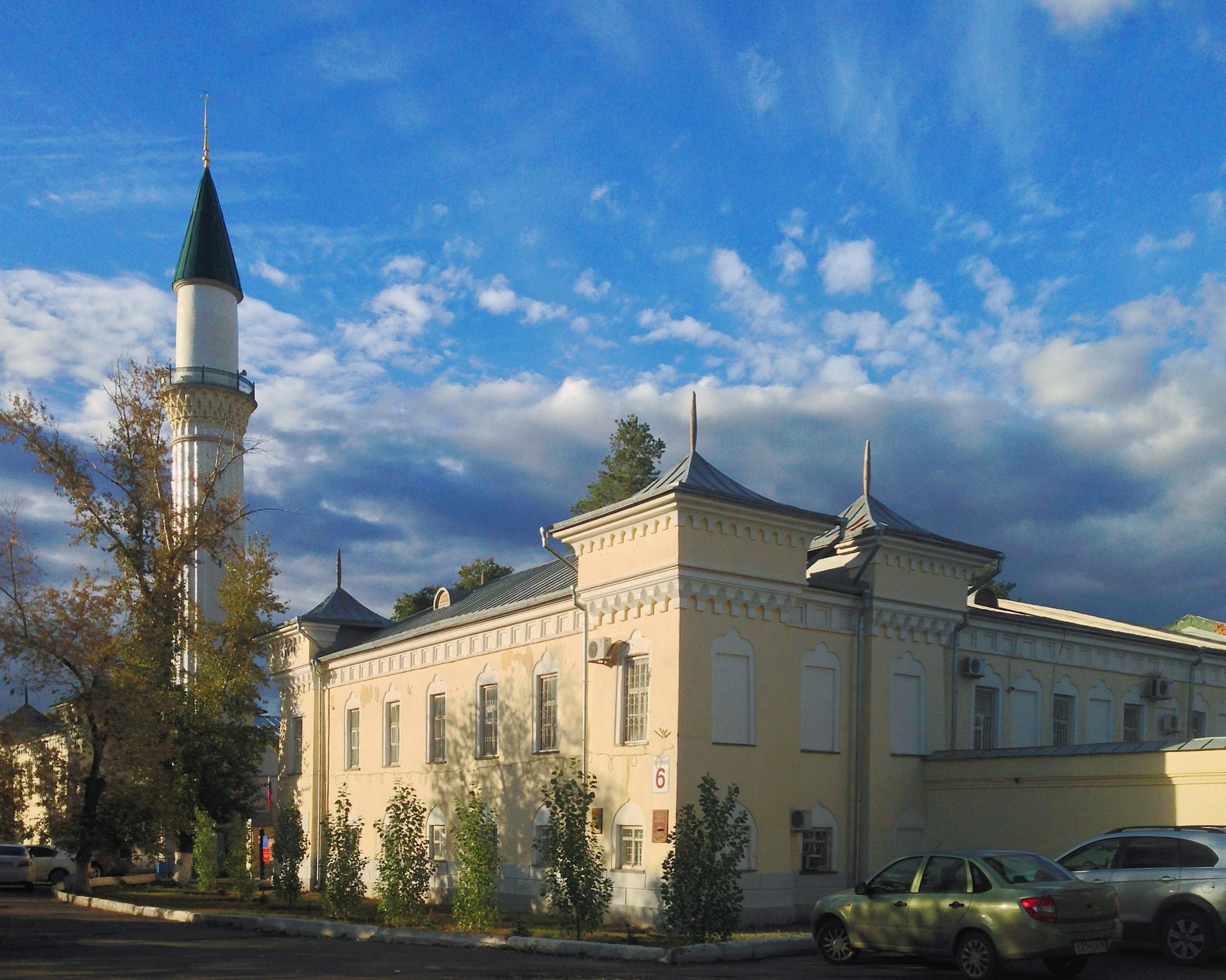 Постоялый двор (основной корпус) (Оренбургская область, Оренбург, Парковый пр., 6)